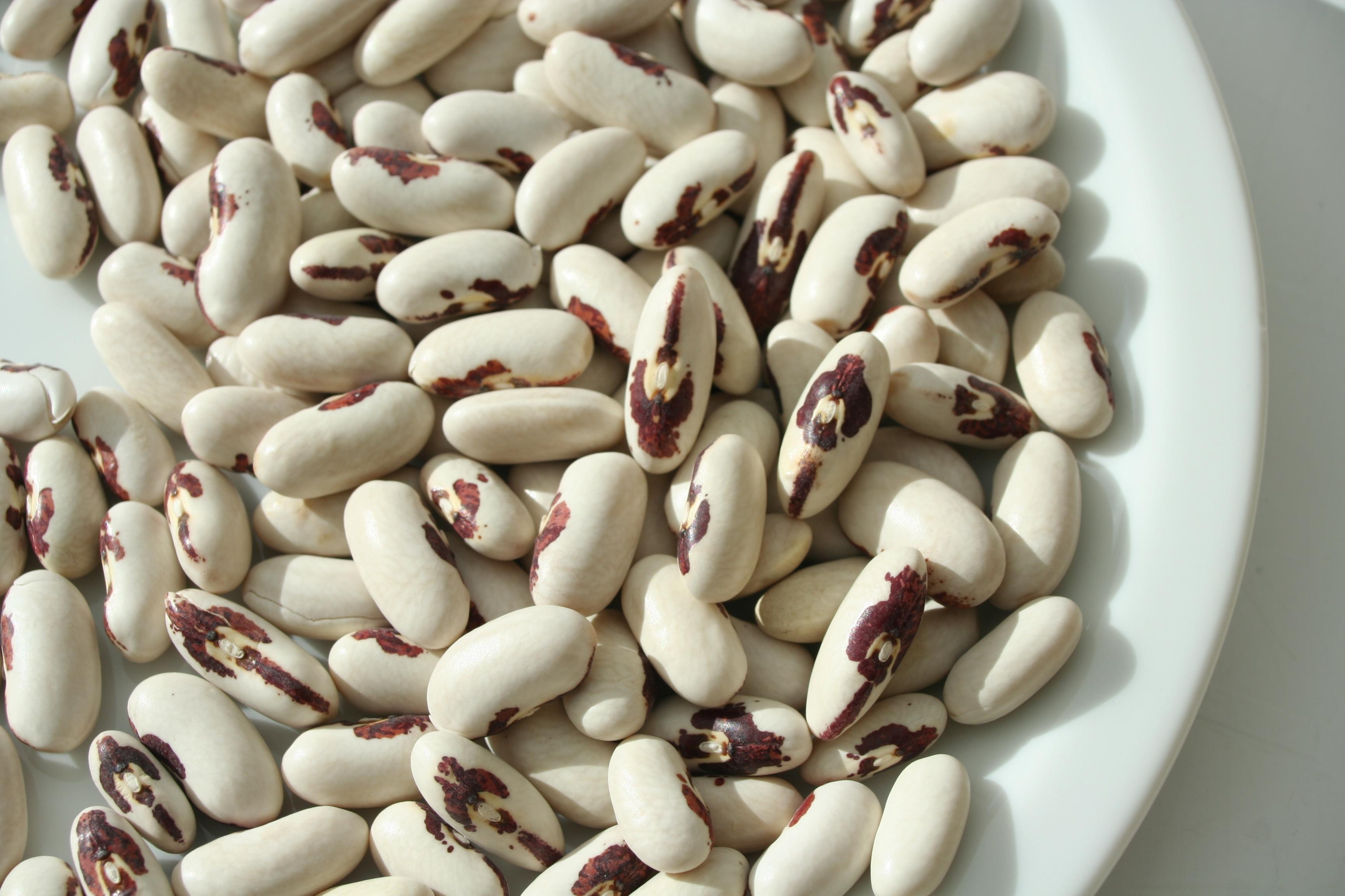 Haricots 'Nombril de bonne soeur' (Phaseolus vulgaris)